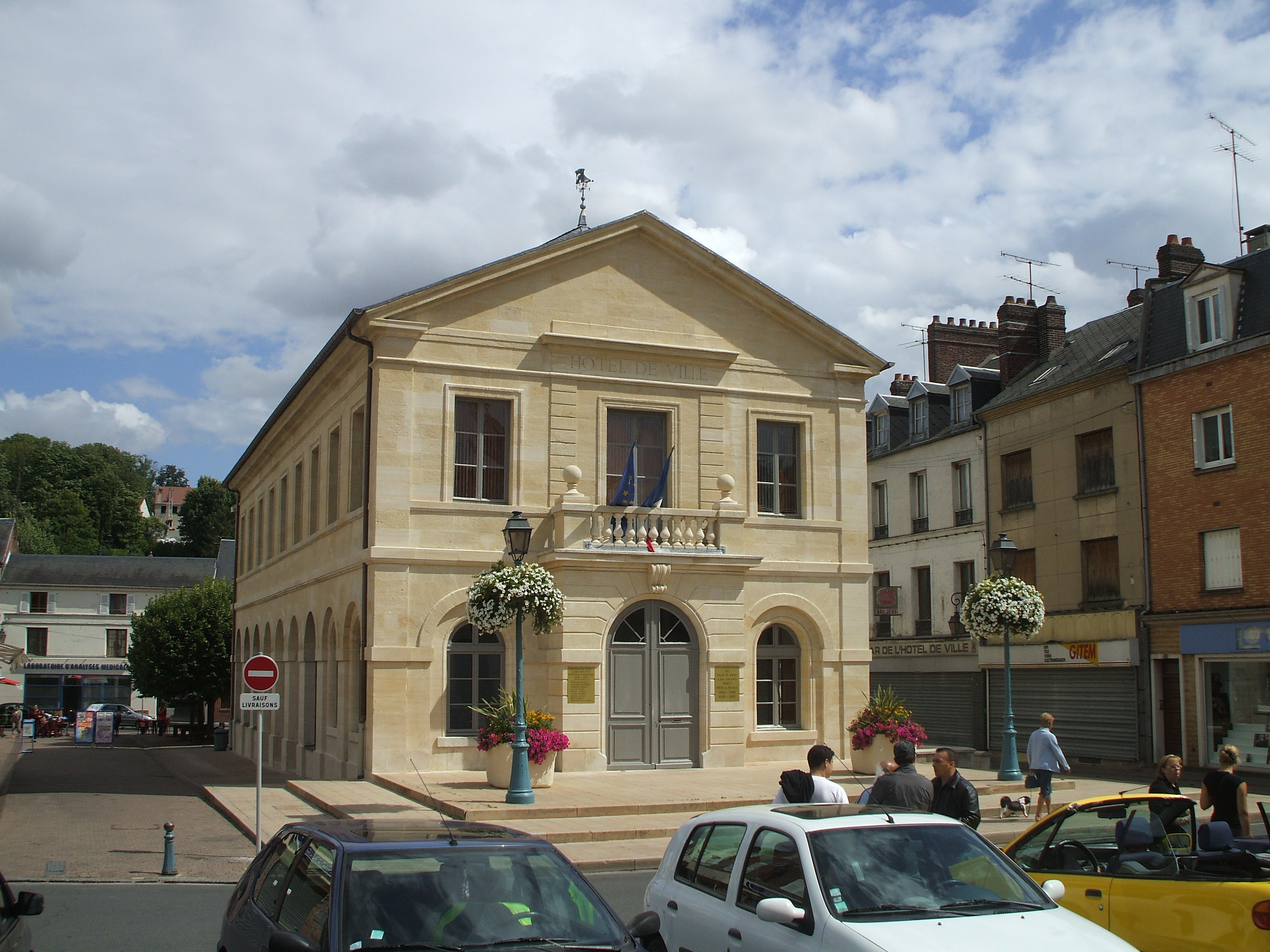 Mairie de Méru oise france